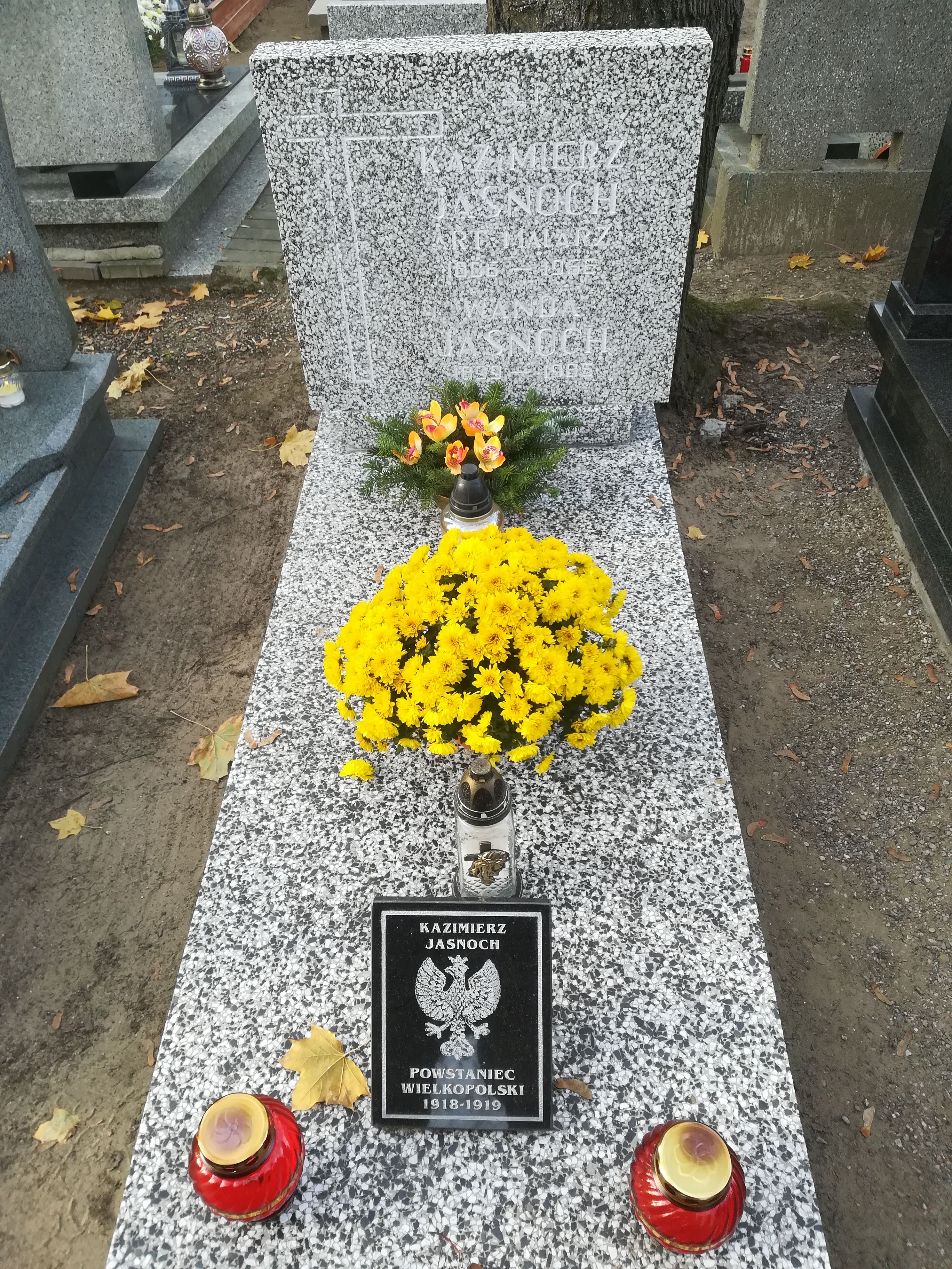 Grób malarza i powstańca wielkopolskiego - Kazimierza Jasnocha na cm. górczyńskim w Poznaniu.